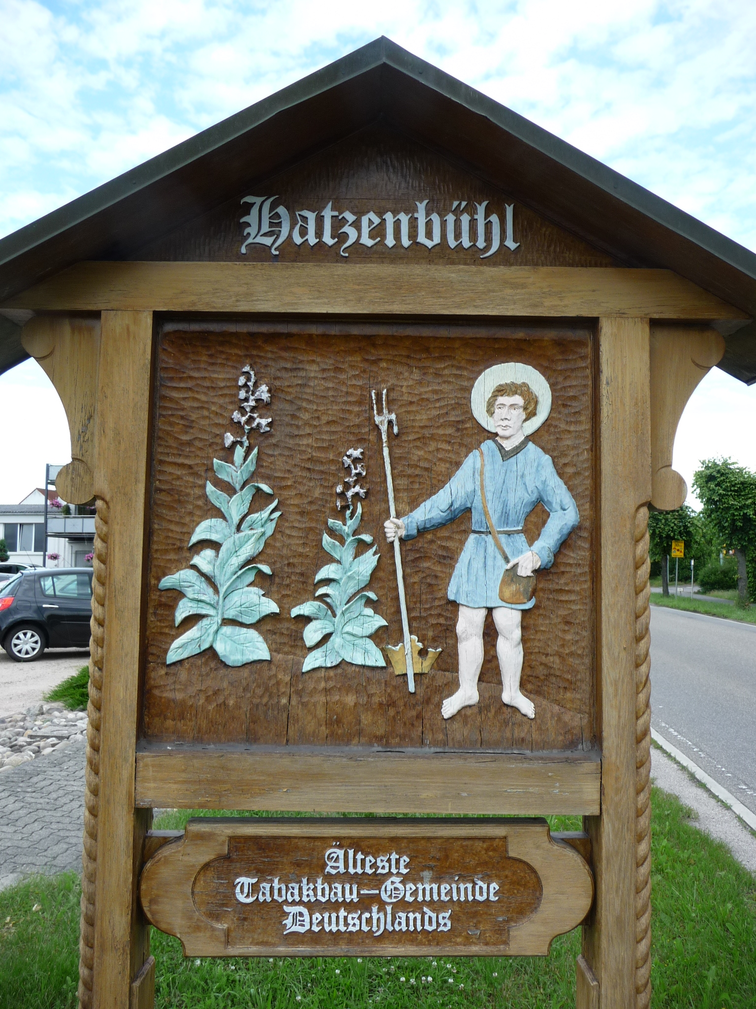 Hatzenbühl im Landkreis Germersheim in Rheinland-Pfalz ist Deutschlands ältester Tabakanbauort.